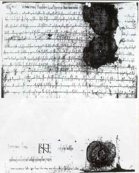 Die erste Erwähnung von Beuna als "Bunivua" auf einer Schenkungsurkunde, in der Heinrich II. das Rittergut Niederbeuna dem neu errichteten Bistum Merseburg übergibt.